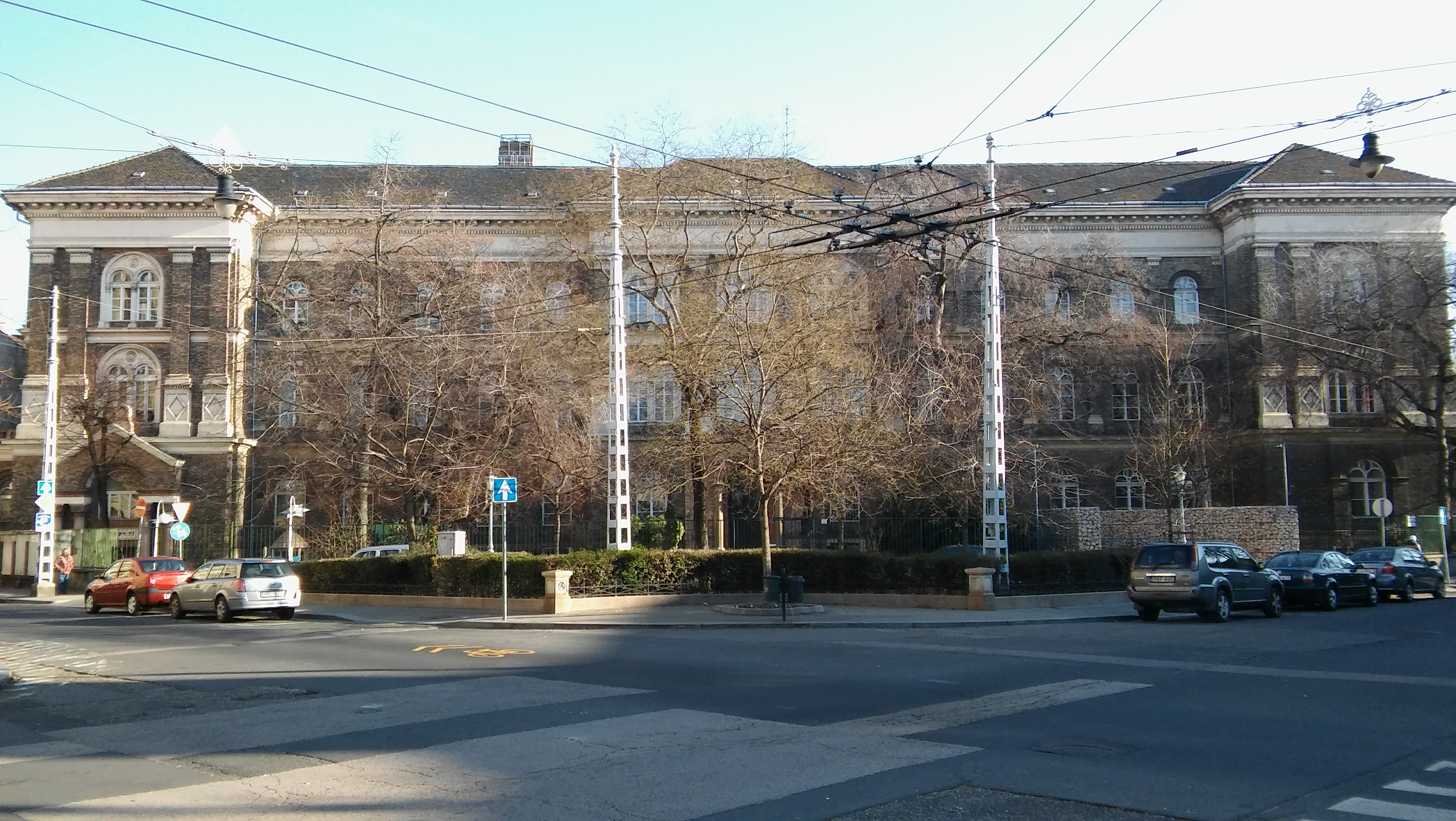 Izraelita Siketnémák Budapesti Országos Intézete